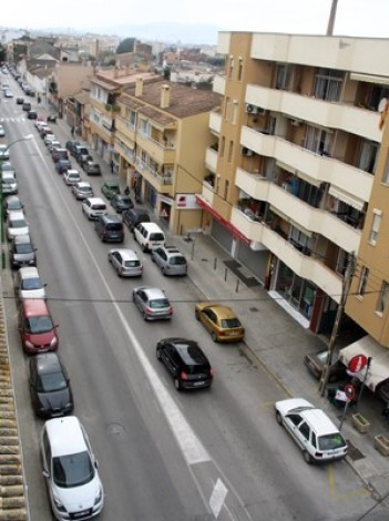 Avenida Antonio Maura de Marratxí